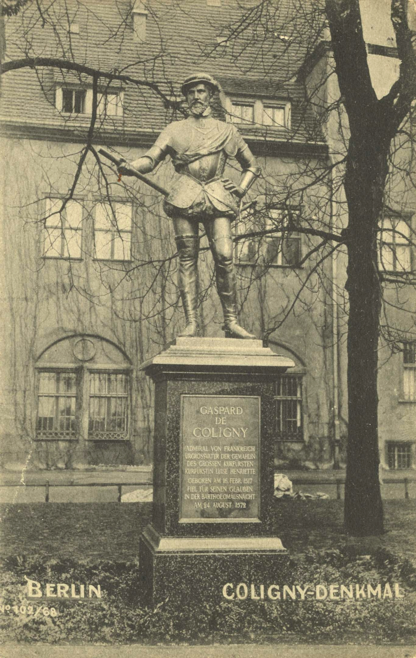 Denkmal Gaspard de Coligny vor Portal V des Berliner Schlosses